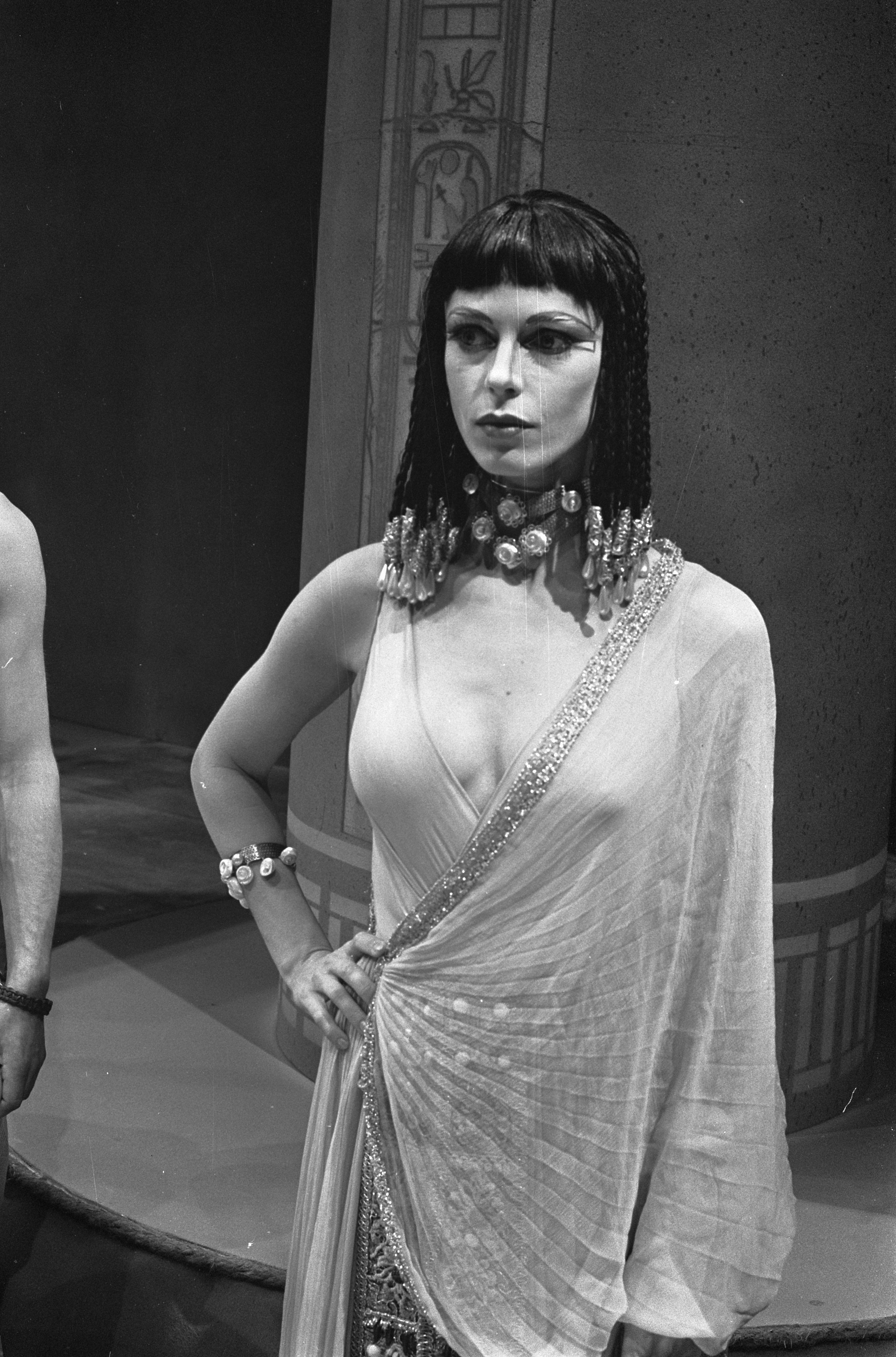 VPRO TV-stuk Ramcinitos en de dief van Herodotes met Ton van Duinhoven en Cox Habbema, Cox Habbema als Egyptische schone